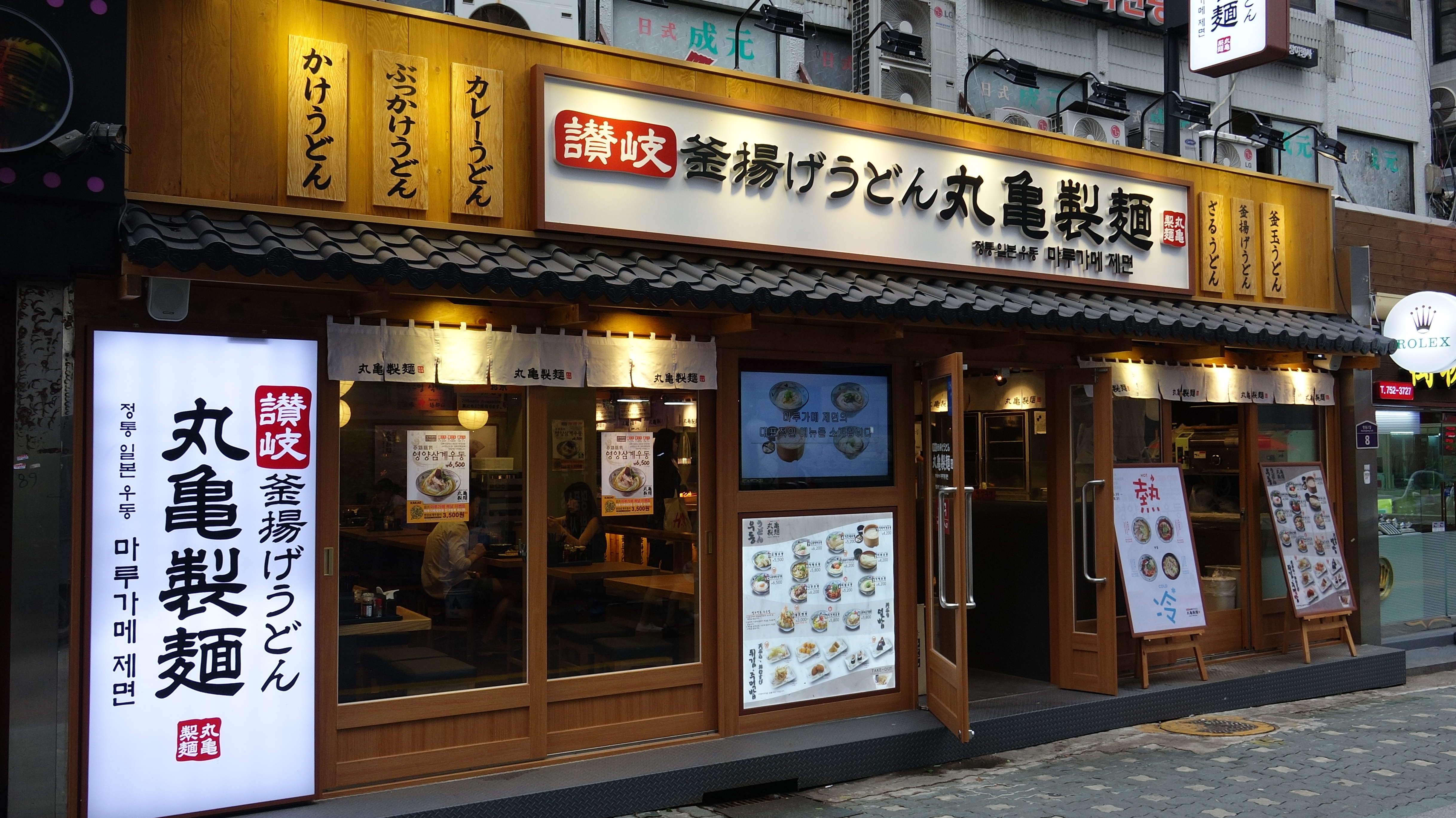 丸亀製麺 明洞店（韓国・ソウル特別市中区）